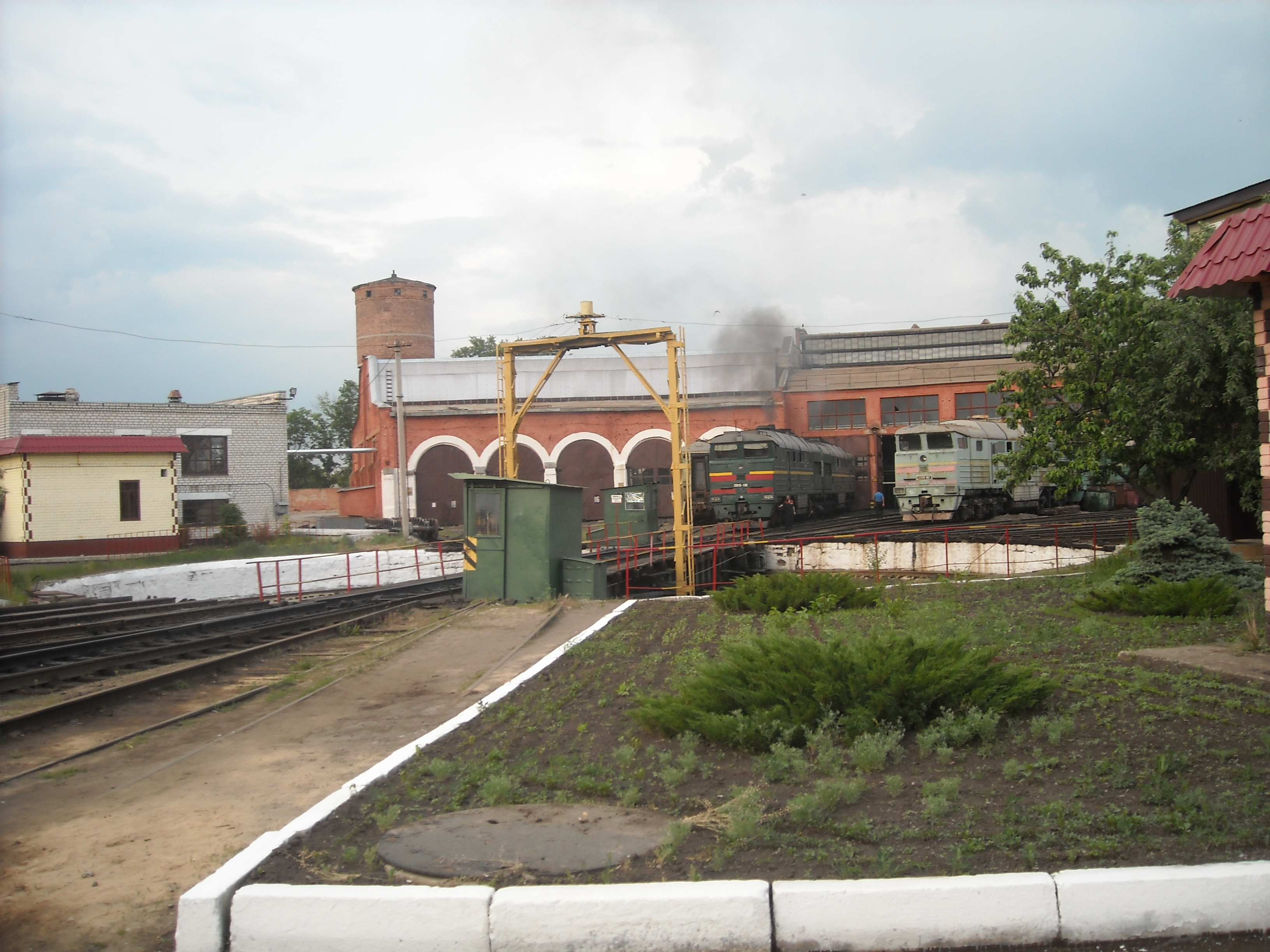 Україна. Харків. Основ'янське депо